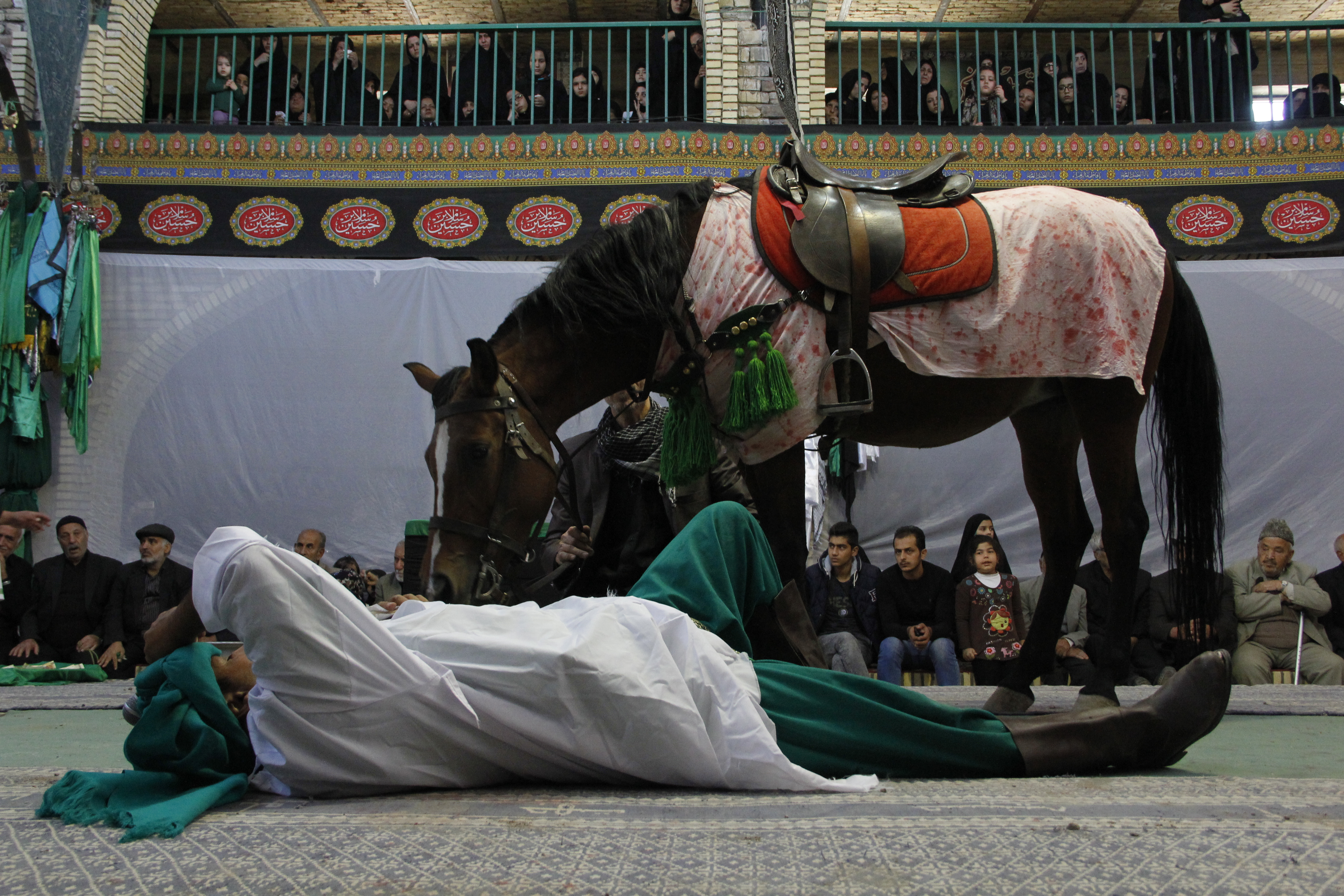 تعزیه ایران- تفرش- مرکزی- - تکیه میانده- عاشورا